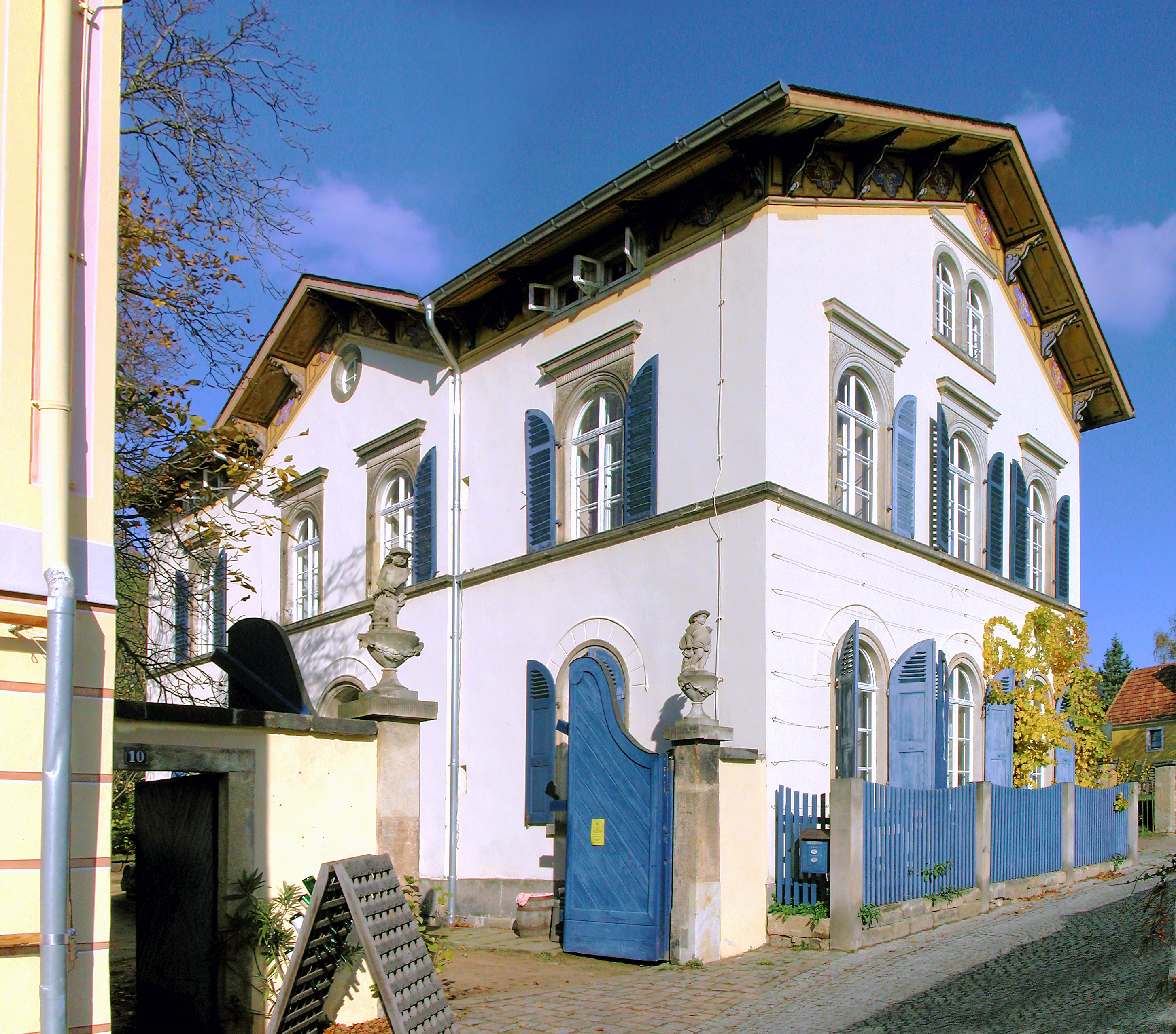 23.10.2008 01445 Radebeul-Oberlößnitz, Weinbergstraße 10: Meinholds Weinberg. Die Landhausvilla wurde um 1850-53 von C. E. Johne für Familie Meinhold errichtet. [DSCN34897-34898.TIF]20081023440MDR.JPG(c)Blobelt